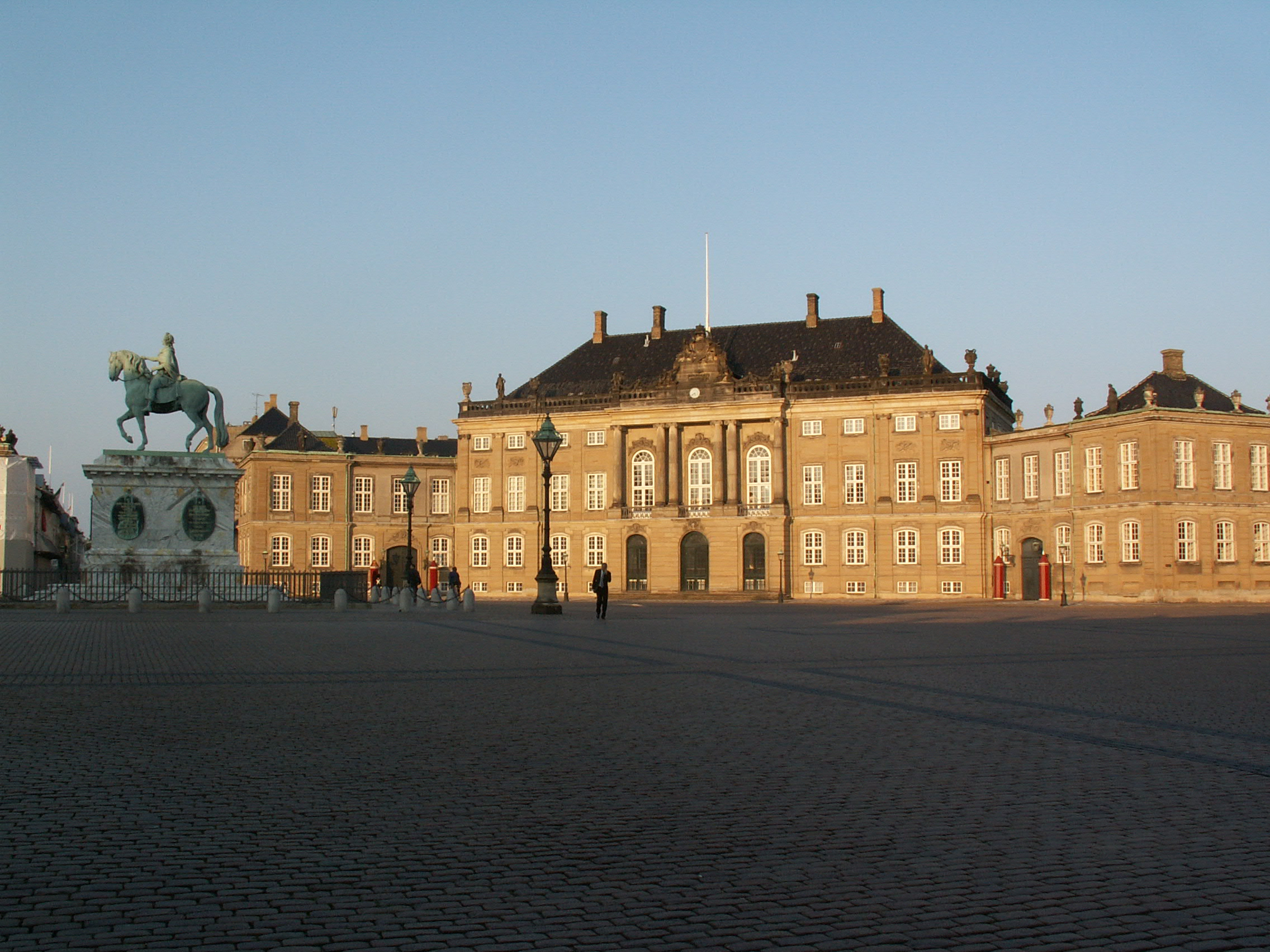 Schloss Amalienborg in Kopenhagen